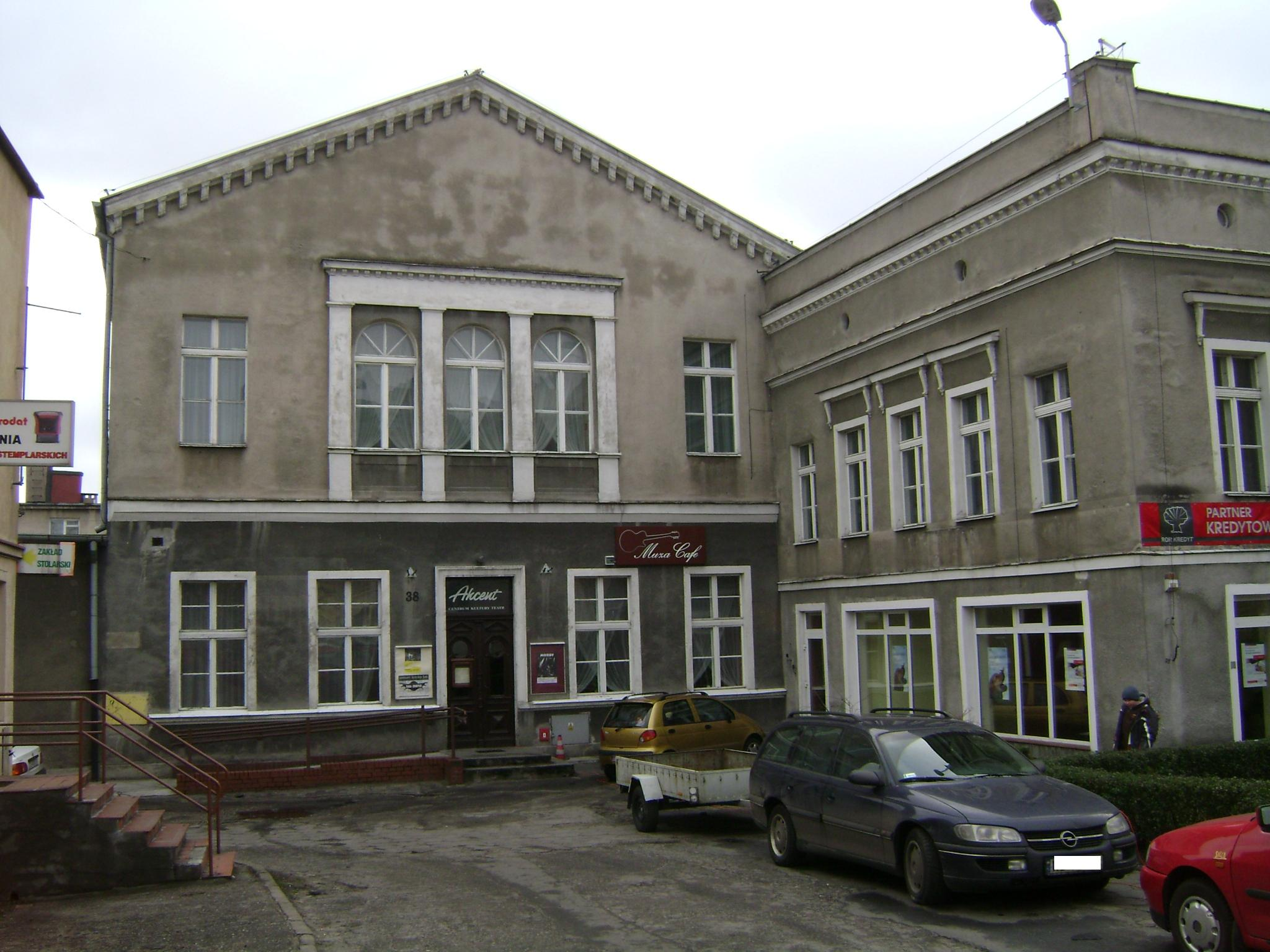 Grudziądz - ul. Józefa Wybickiego 38/40 - Klub "Akcent" (dawniej loża masońska